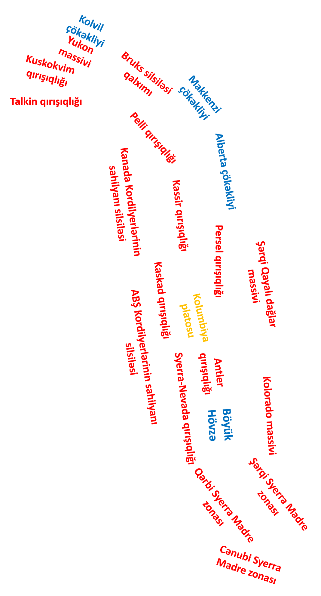 Kordilyerlərin relyefi, burada yerləşən silsilələr, çökəkliklər, yaylalar və s. göstərilmişdir.